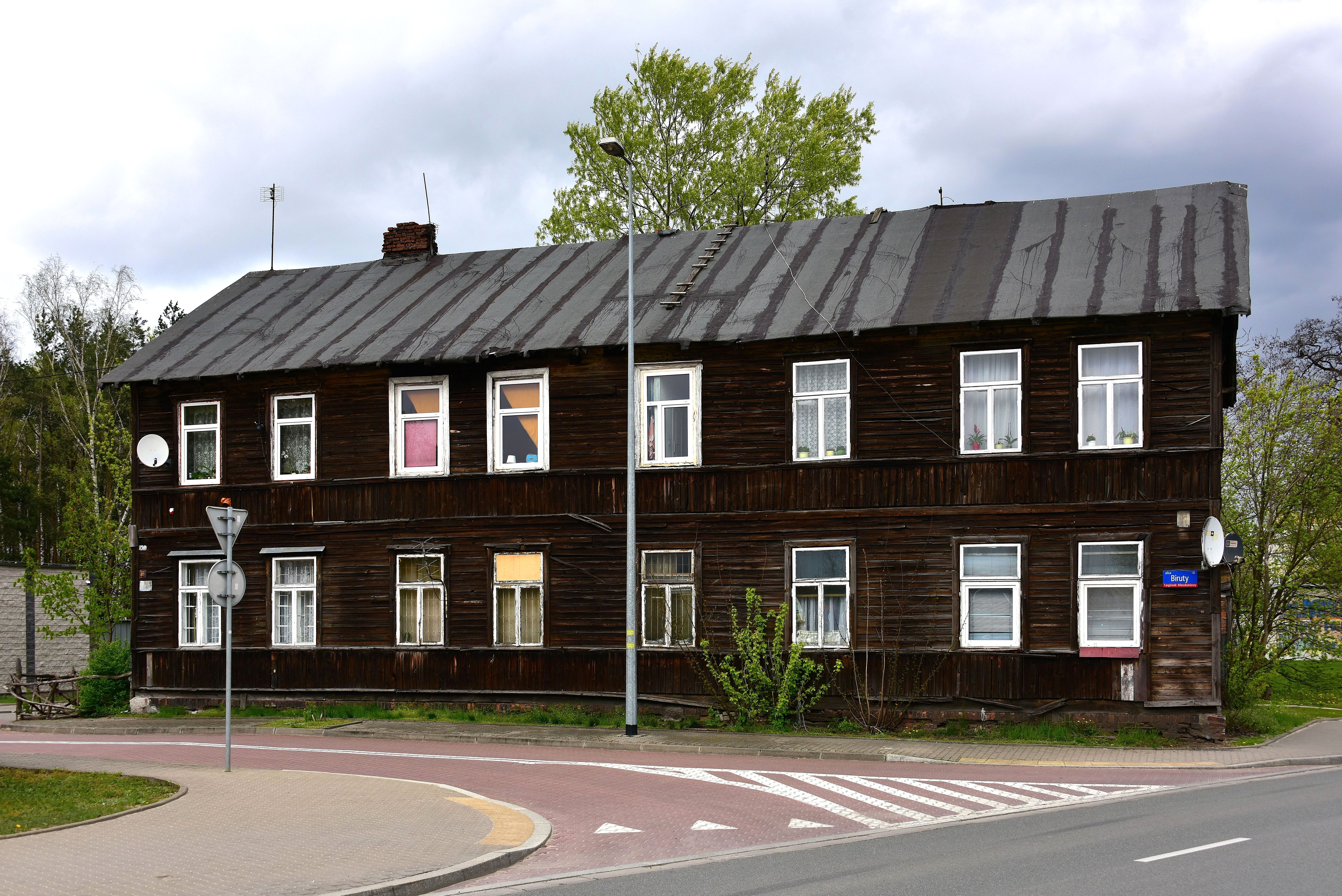 Kamienica Paprockiego przy ul. Biruty 18 w Warszawie